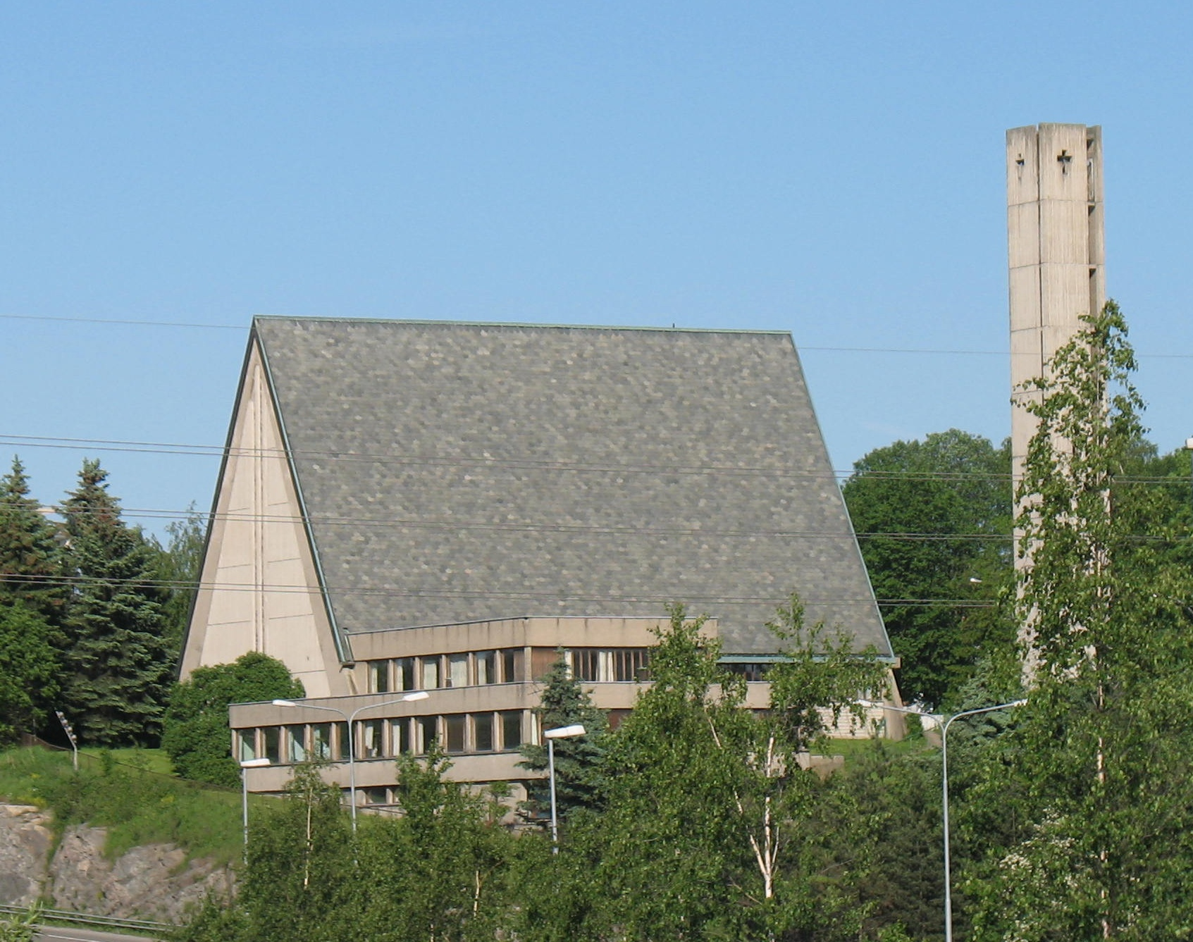 Manglerud kirke, sett fra Ryen